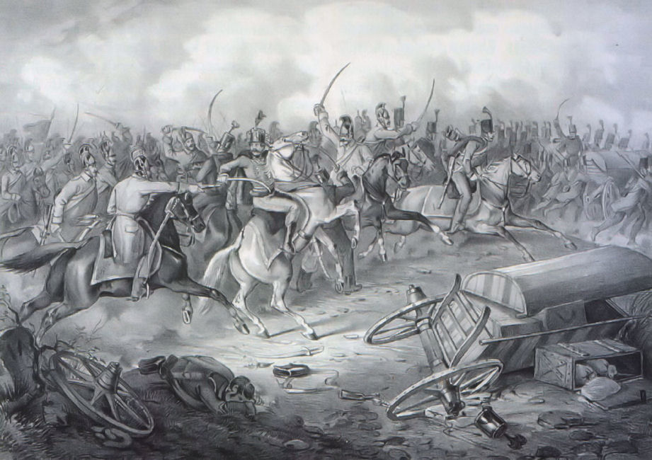 Košická bitka 1849